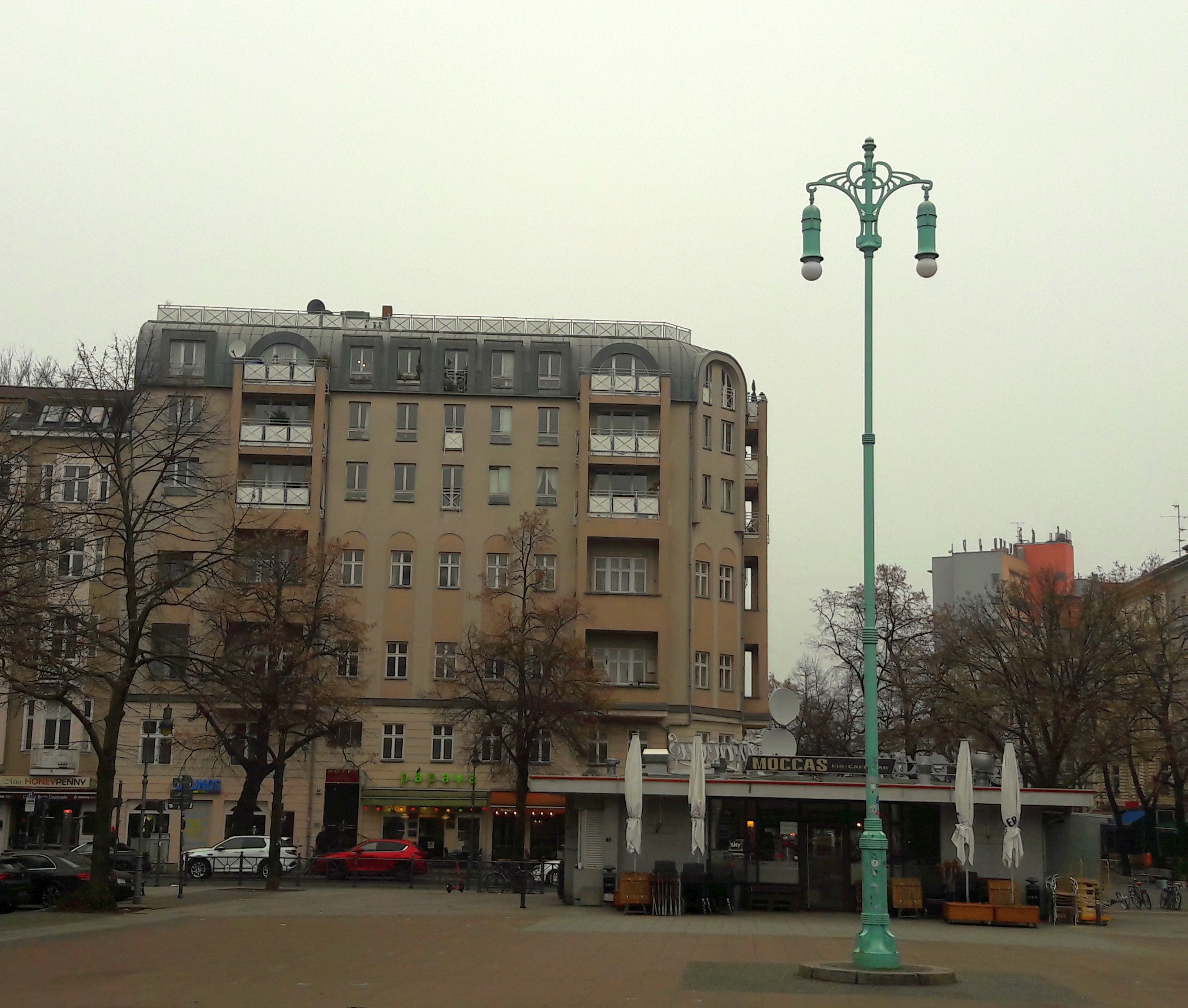 einer von drei alten Bogenlampenkandelabern auf dem Winterfeldtplatz in Berlin Schöneberg, Januar 2020